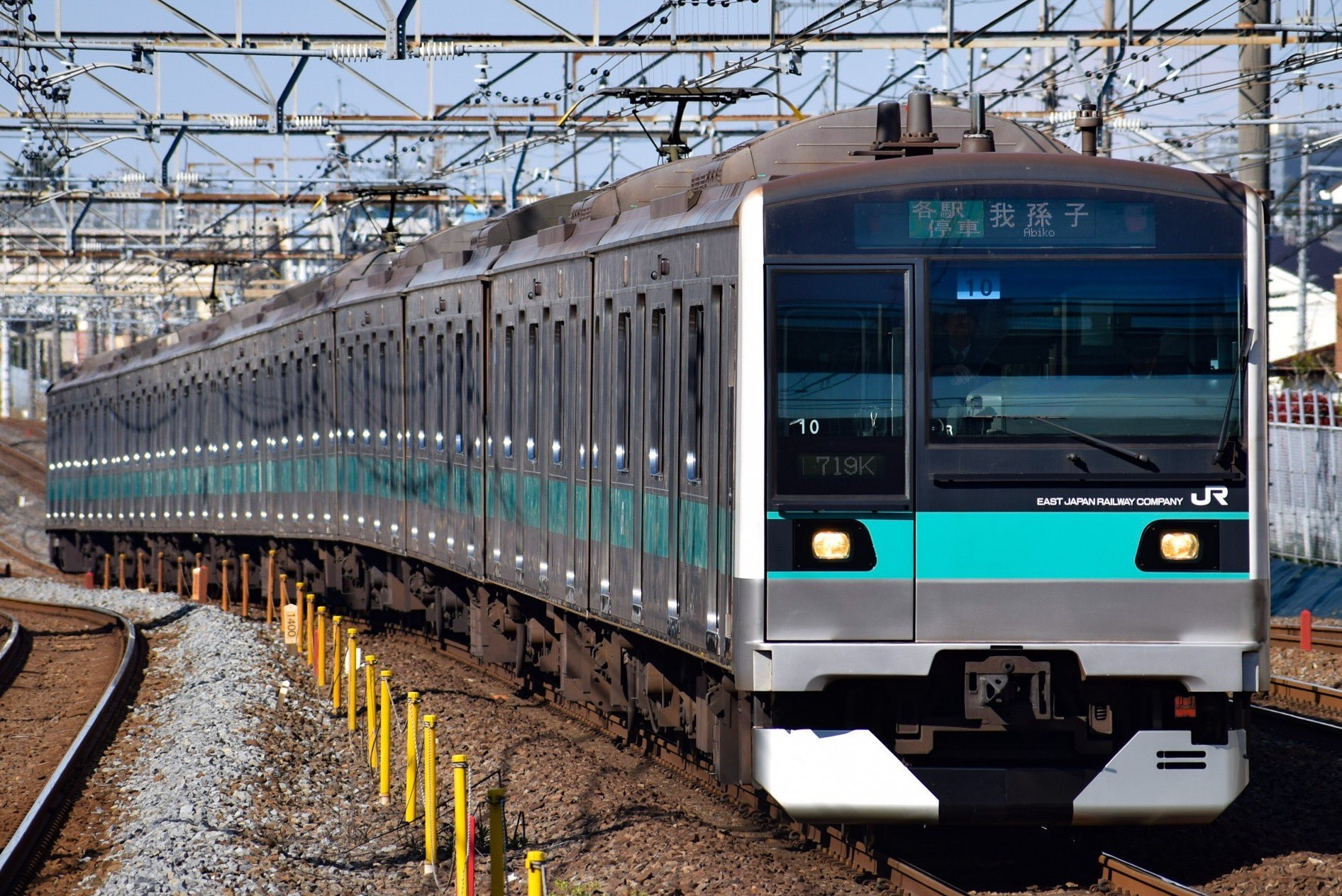 常磐緩行線を走るE233系2000番台マト10編成(719K 各停我孫子行)